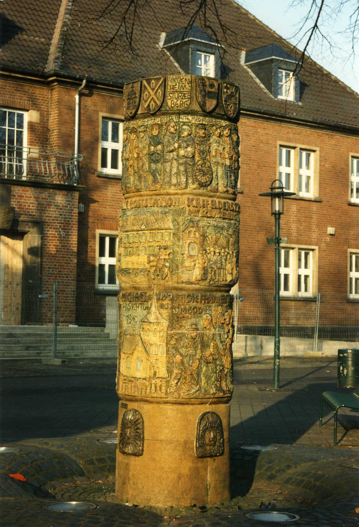 Brunnen vor dem historischen Rathaus in Dormagen